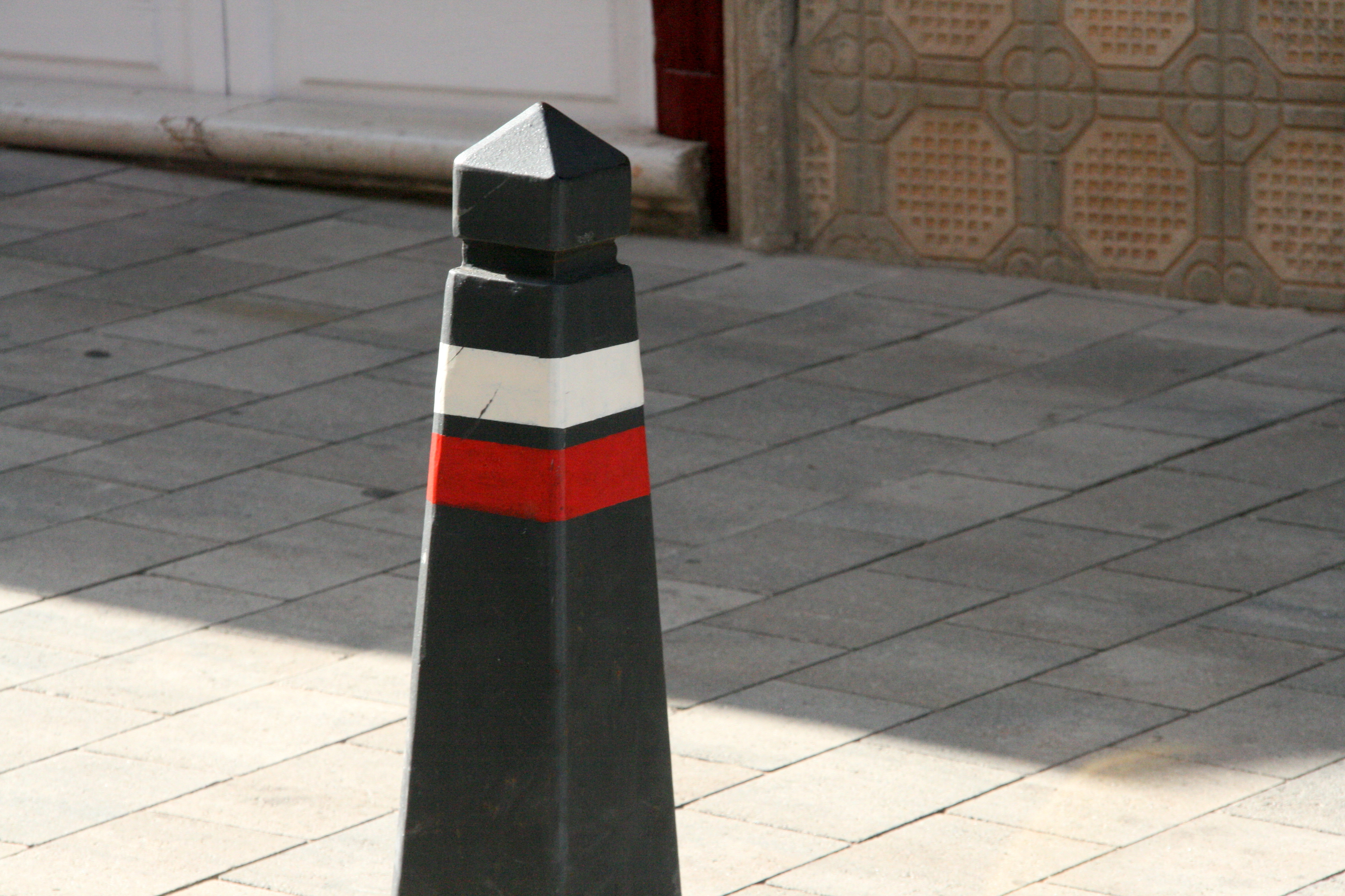 Indicador del camí de Cavalls en Maó